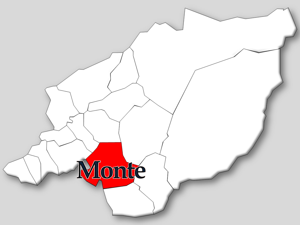 Censos 1864/2011